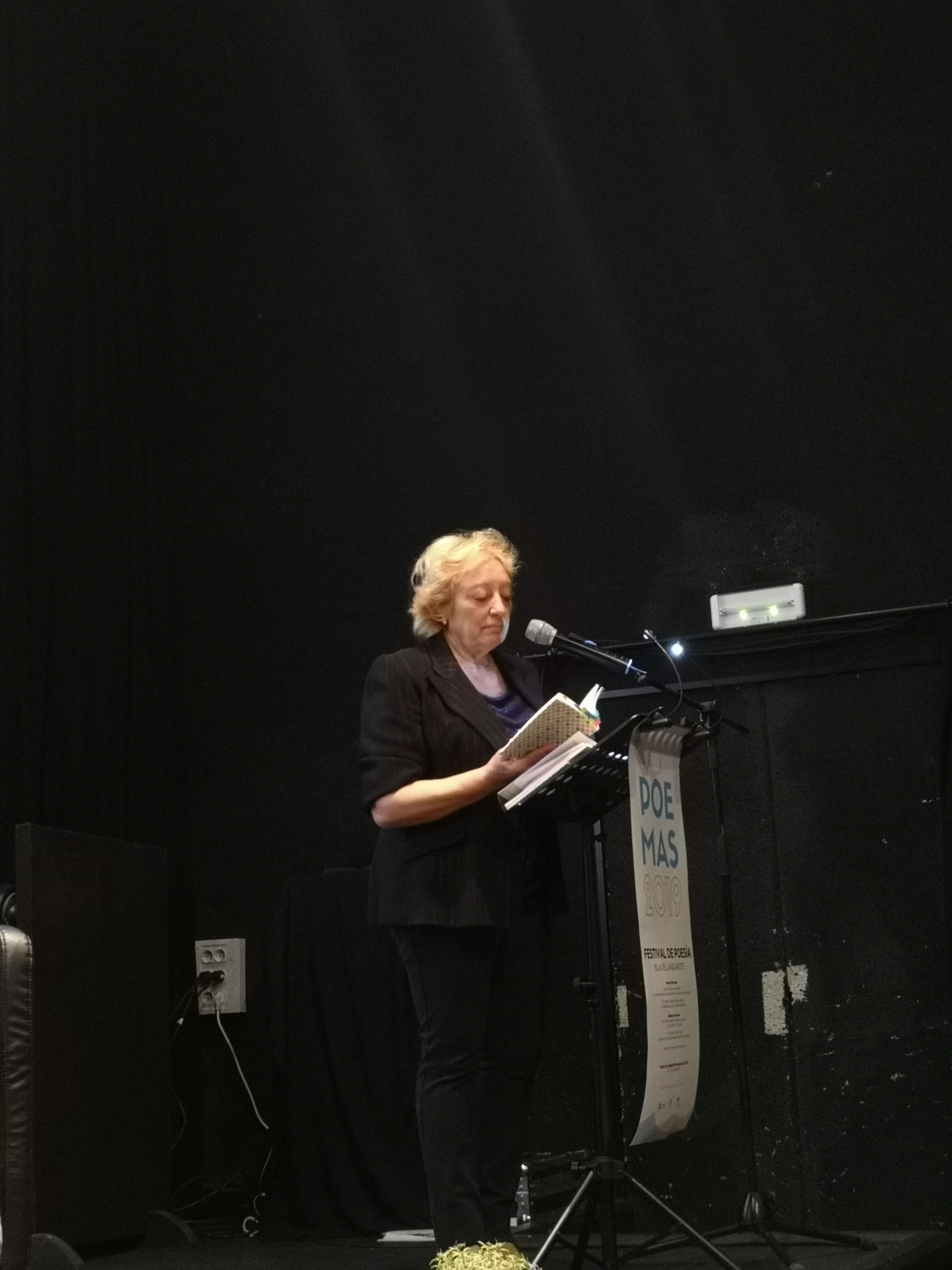 Efi Cubero en el Festival de Poesía en Lanzarote, Enero 2019